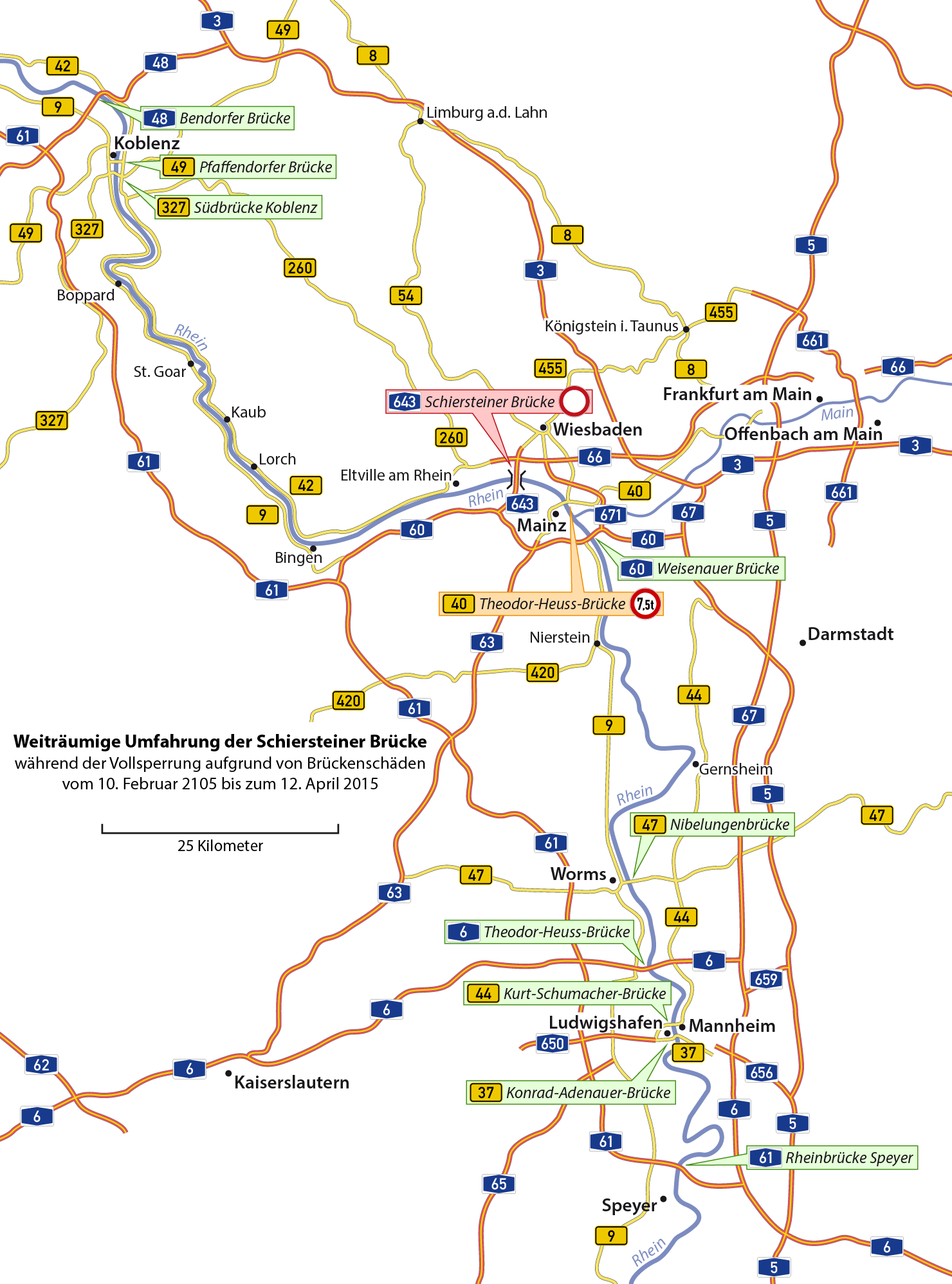 Karte der "Weiträumigen Umfahrung" der Schiersteiner Brücke zwischen Mainz und Wiesbaden während der Vollsperrung aufgrund von Brückenschäden vom 10. Februar 2015 bis zum 12. April 2015